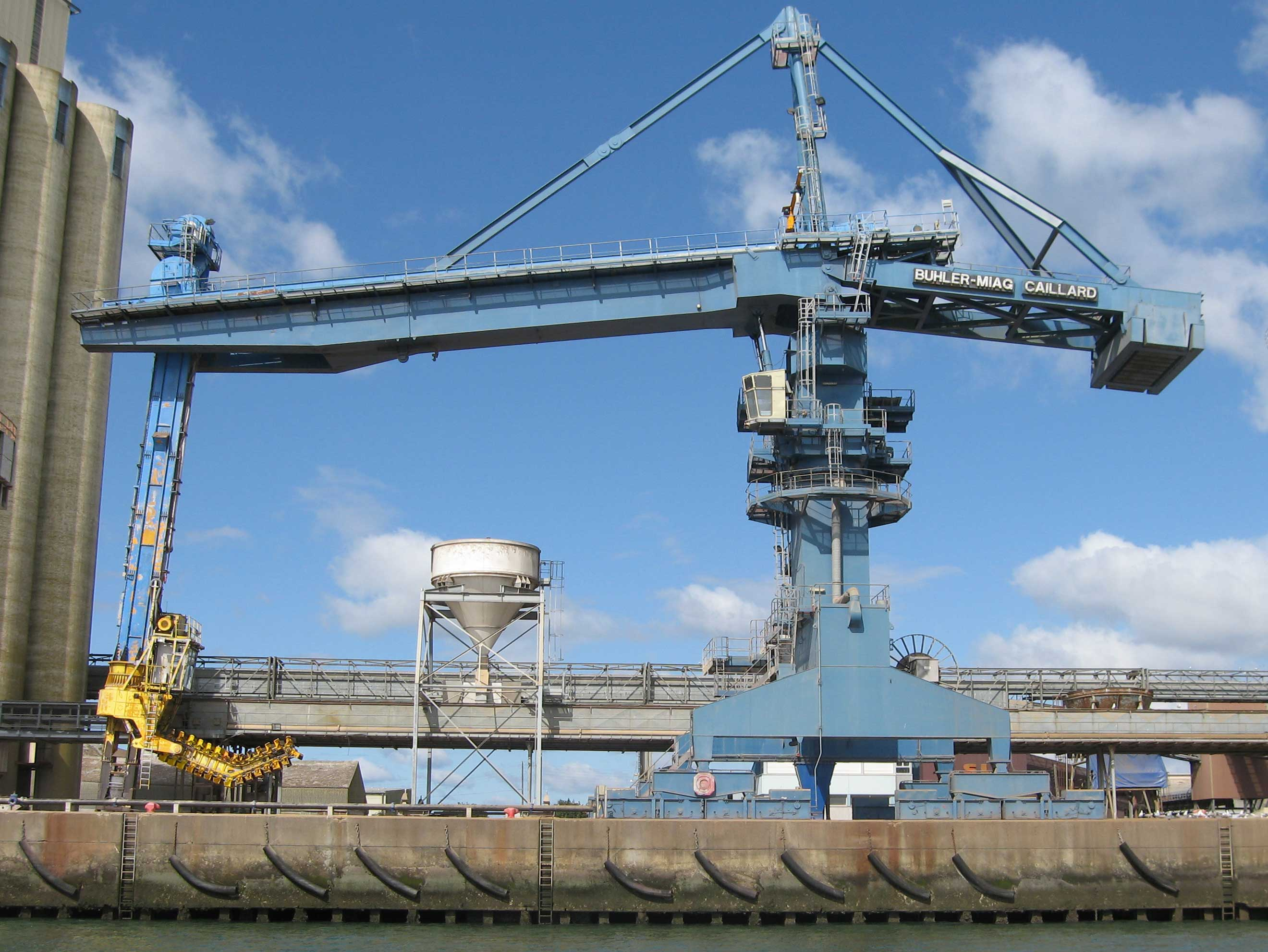 Description : Grue portuaire utilisée pour les produits en vrac (soja) Place : Lorient, Bretagne, France Date : 2006 Auteur : Pline